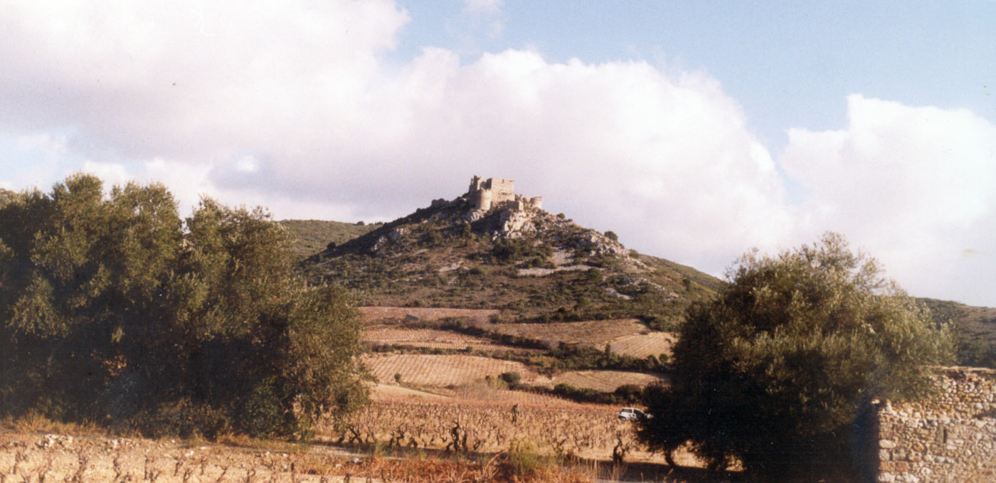 Castell Aguilar